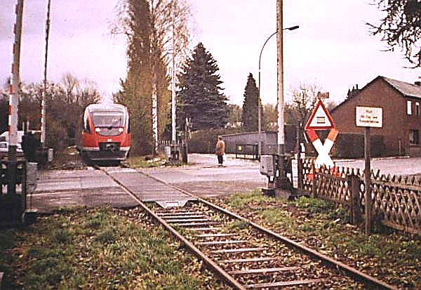 Bombardier Talent BR 643.2 der Euregiobahn auf der Strecke Lindern-Heinsberg auf Sonderfahrt mit Politikern aus den Kreisen Düren, Aachen, Heinsberg und Regionalräten im Bahnhof Oberbruch